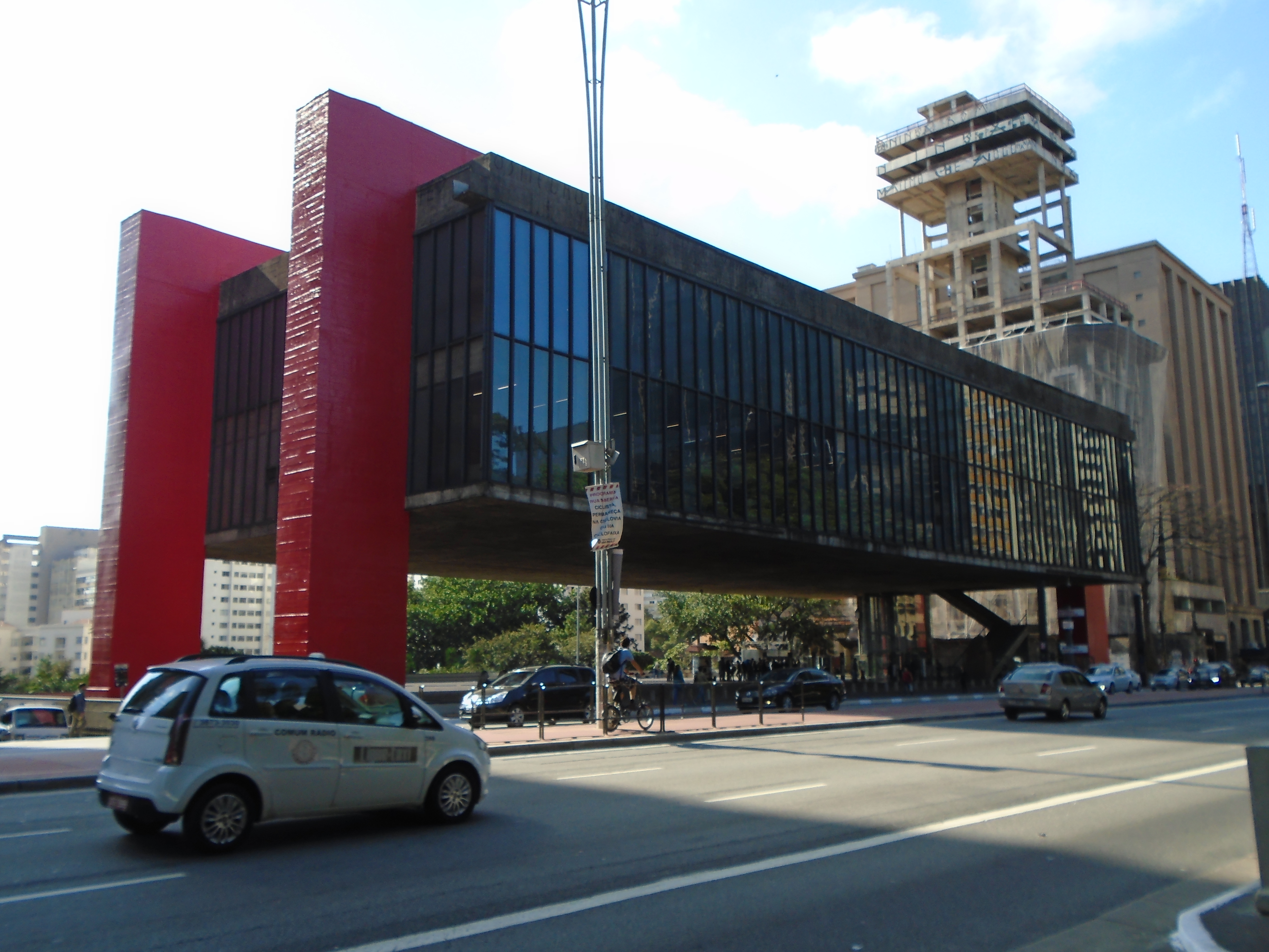 Museu de Arte de São Paulo (Exterior)